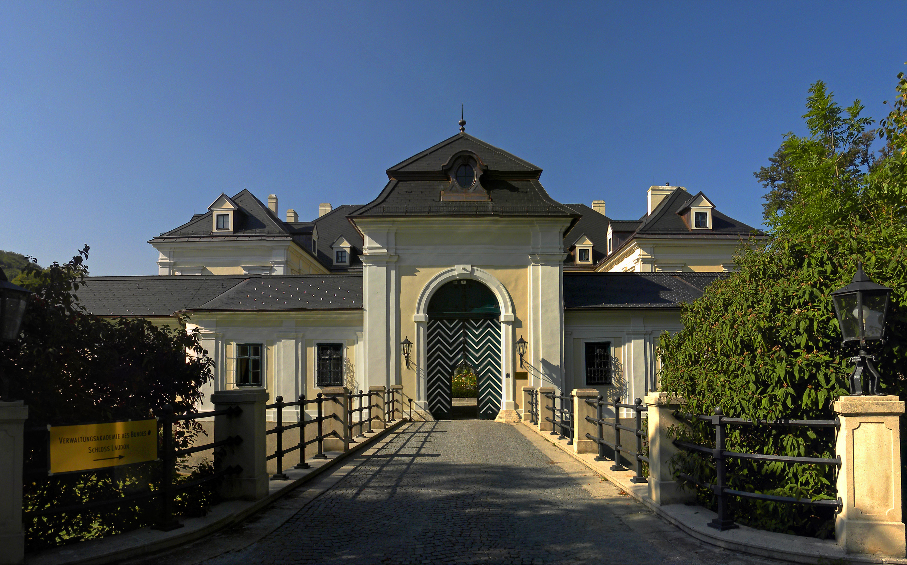 Schloss Laudon